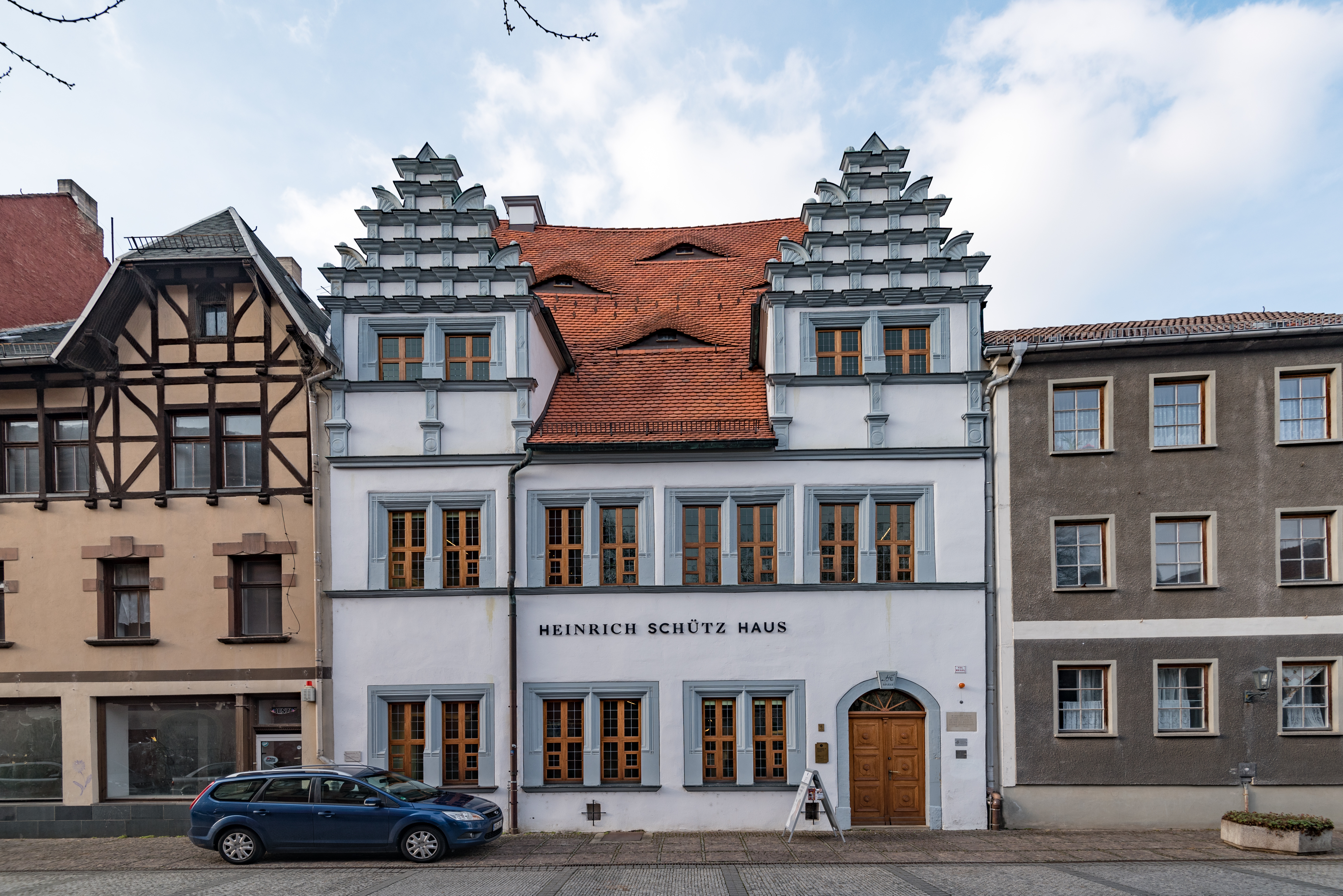 Weißenfels, Nikolaistraße 13